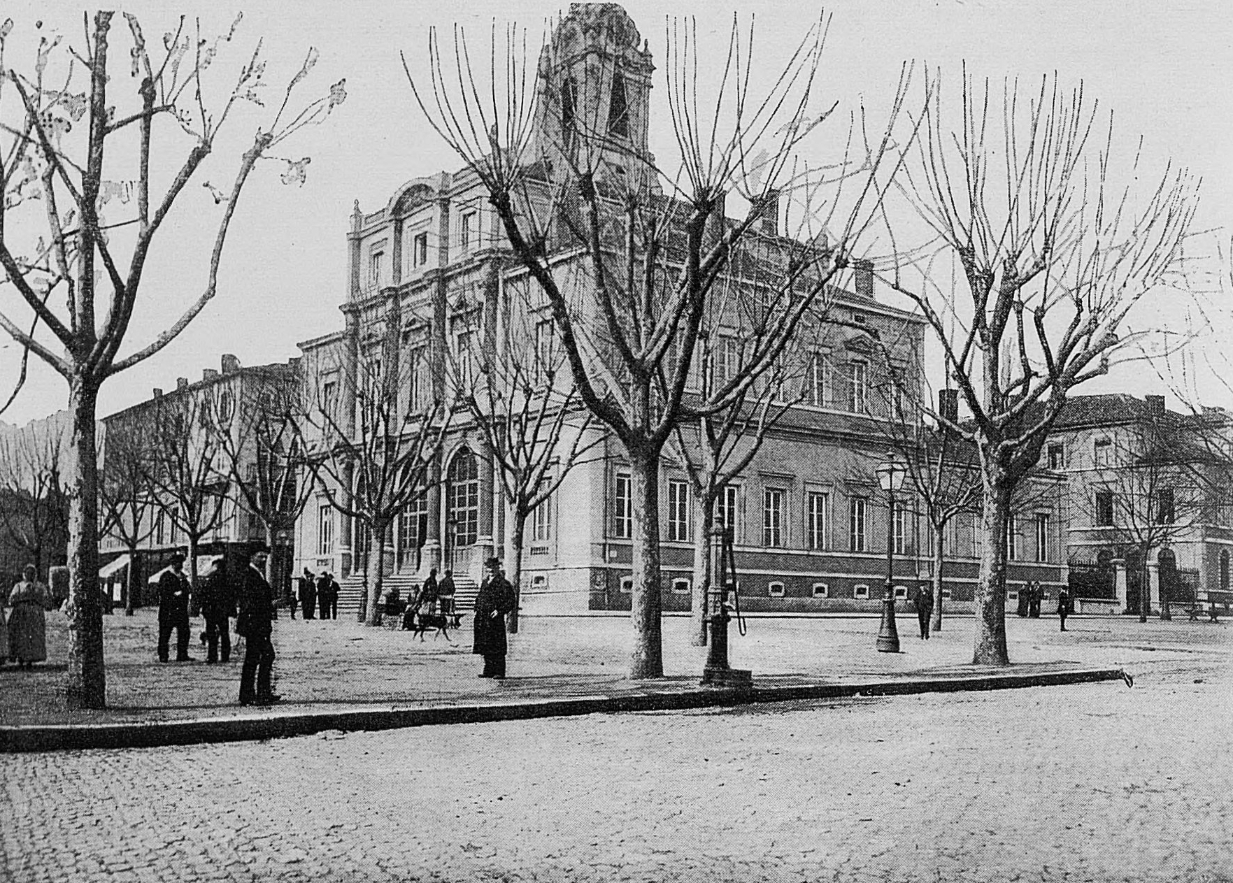 Dictionnaire illustré des communes du département du Rhône. Tome 1 / par MM. E. de Rolland et D. Clouzet.